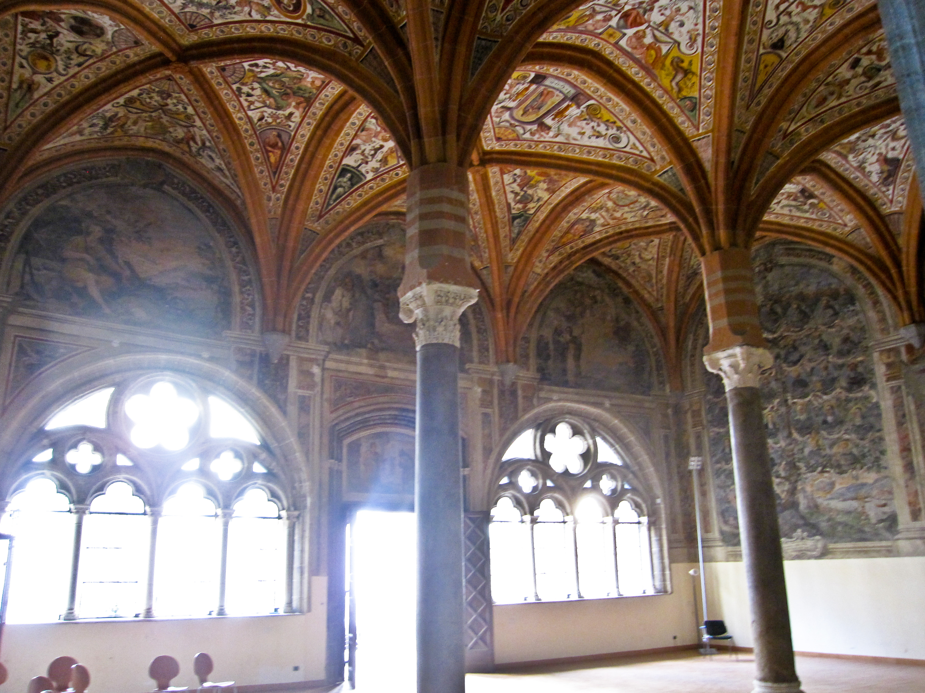 La Sala Capitolare. Complesso di San Lorenzo Maggiore - Napoli.